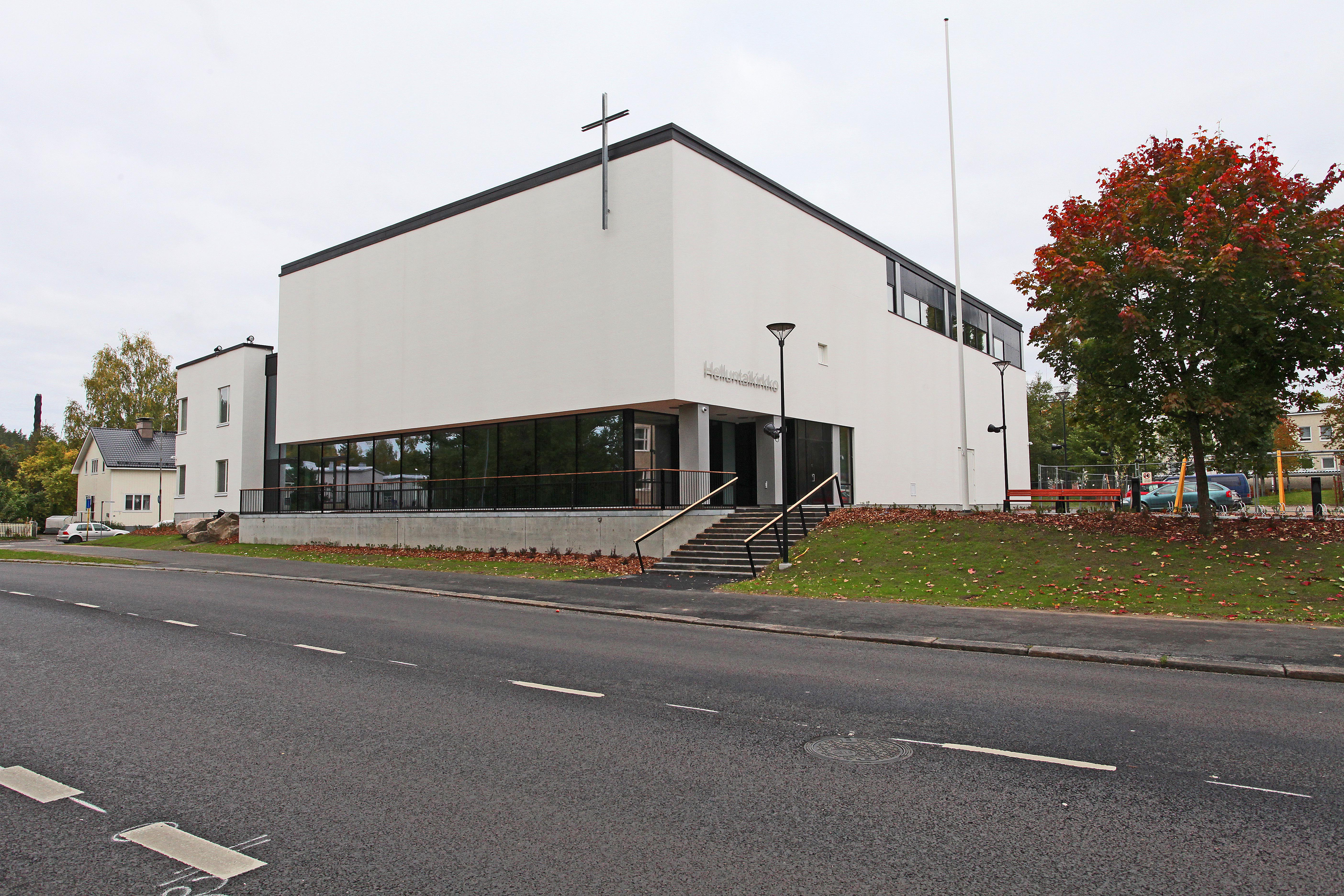 Jyväskylän Helluntaikirkko